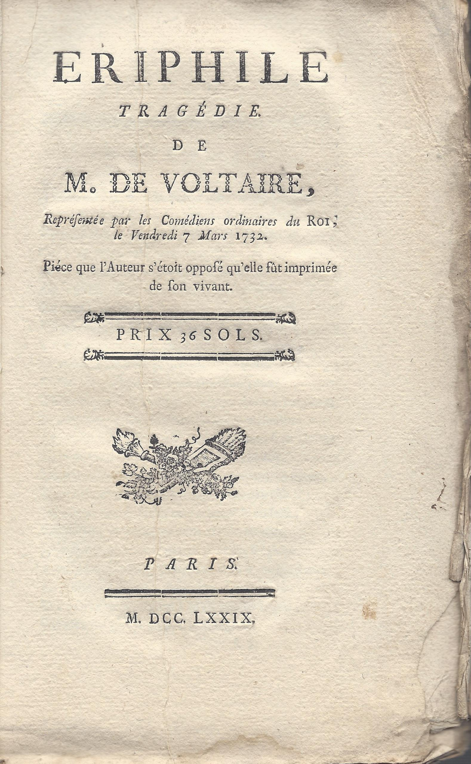 Titelblatt des posthum erschienenen Zweitdruckes von Voltaires Ériphyle, Paris, ohne Verleger, 1779.